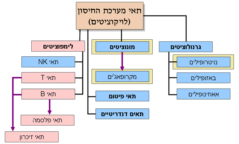 תאי he:מערכת החיסון. עוצב והופק על ידי Pixie